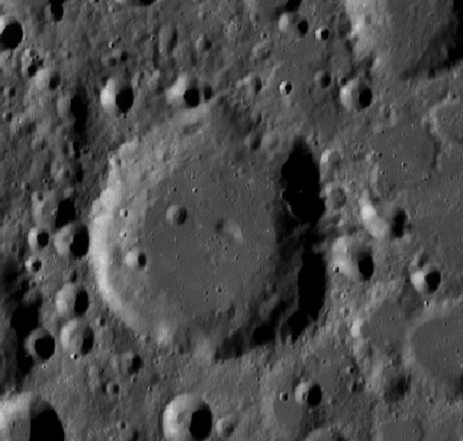 Cráter lunar Schneller. (Imagen LRO)